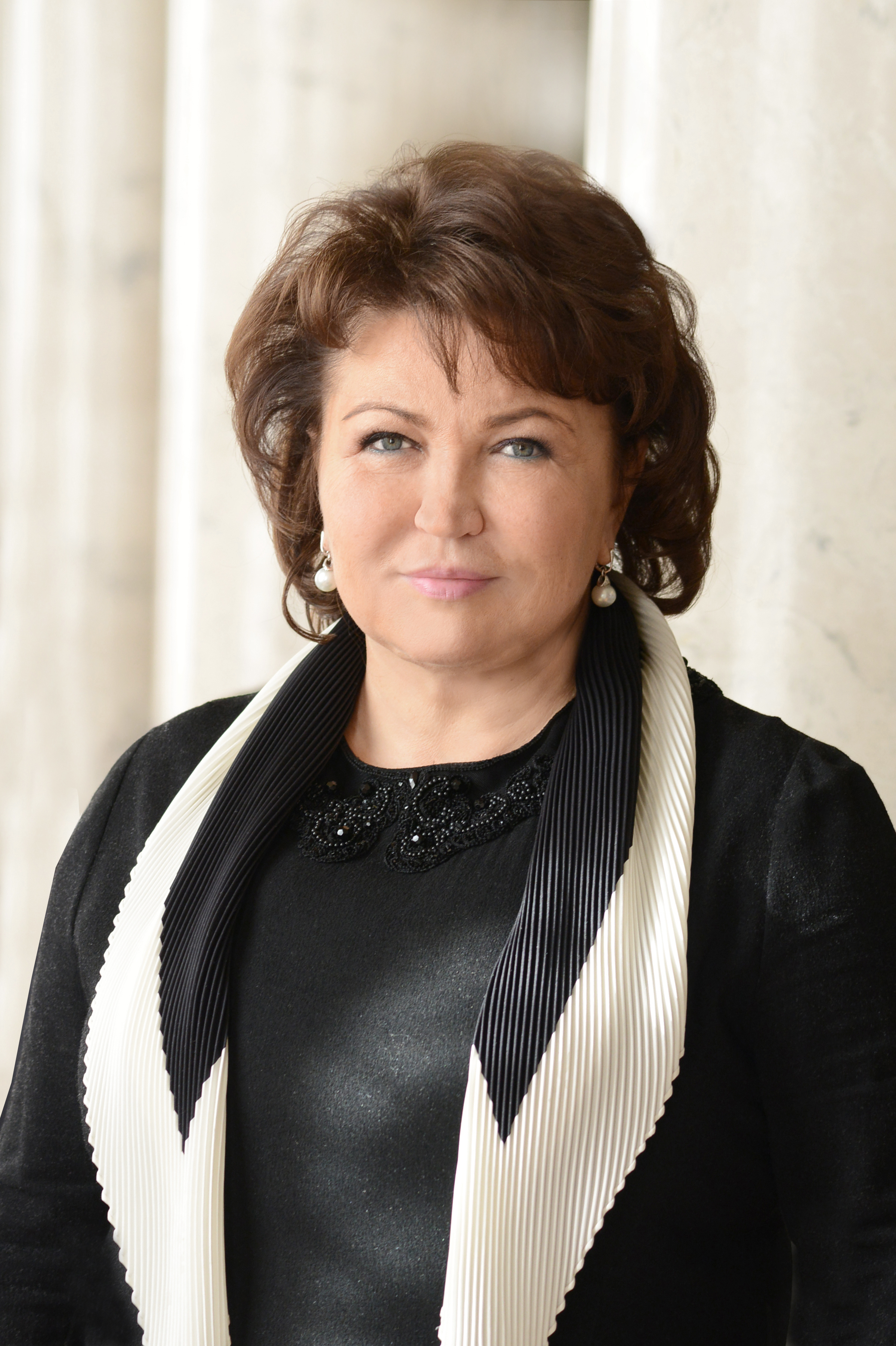 ВЕРХОВНА РАДА УКРАЇНИ 2015 фотограф Вадим Чуприна